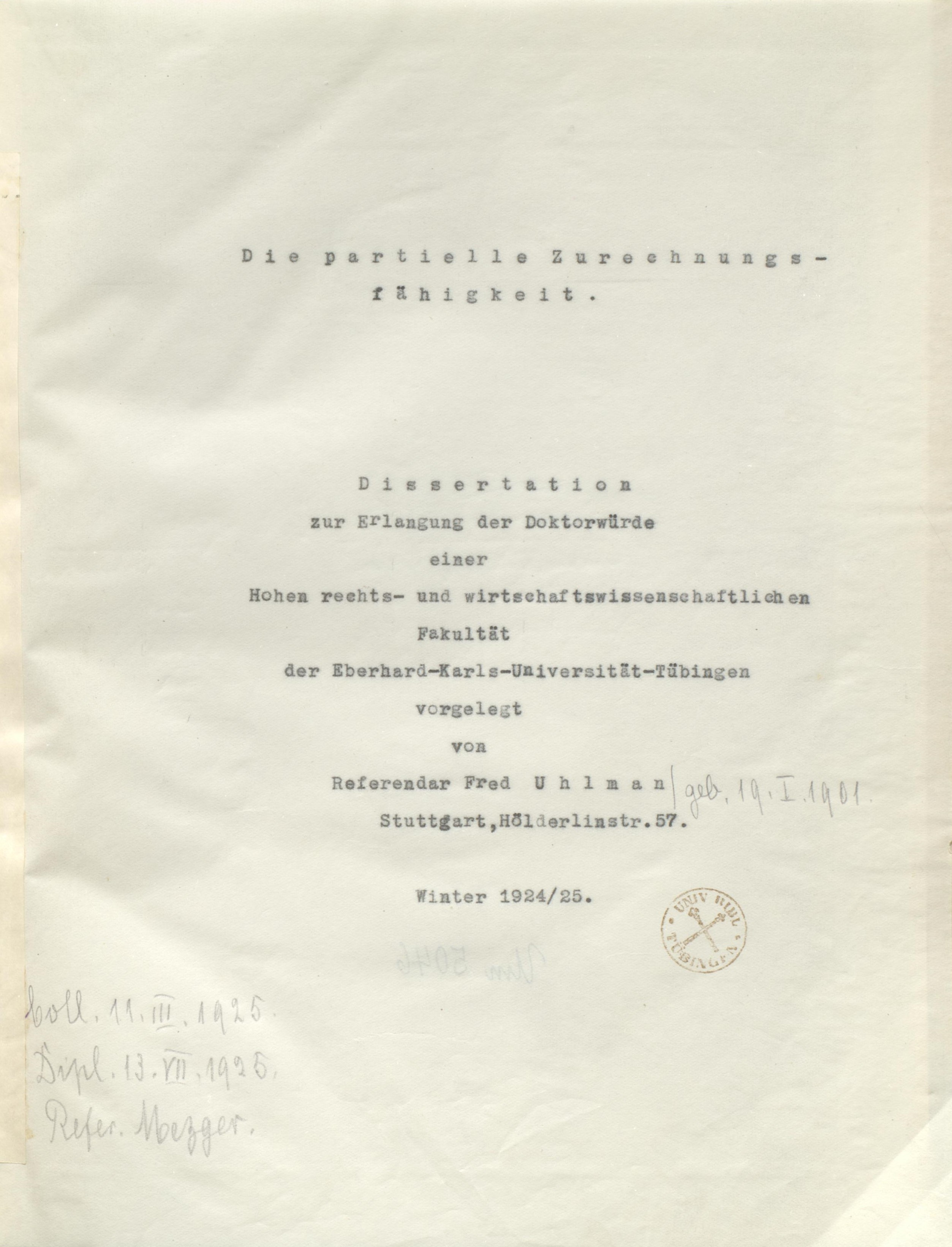 Fred Uhlman Die partielle Zurechnungsfähigkeit. Dissertation an der Universität Tübingen, 1925 [maschinenschriftlich]